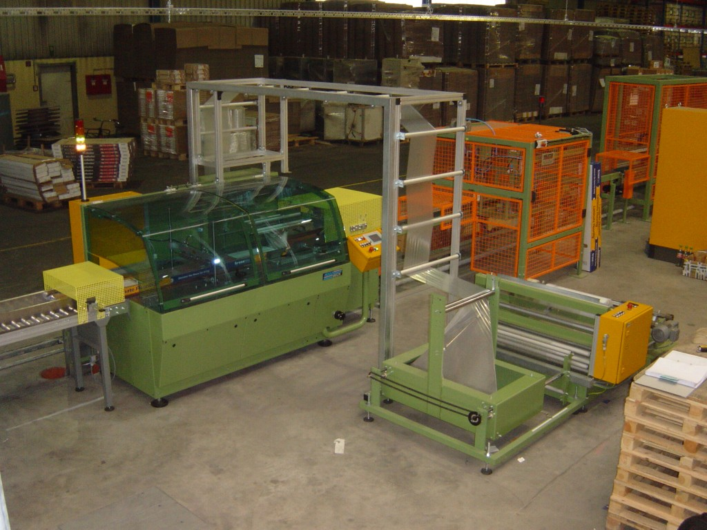 Horizontaler Schlauchbeutelautomat für Laminatfussboden